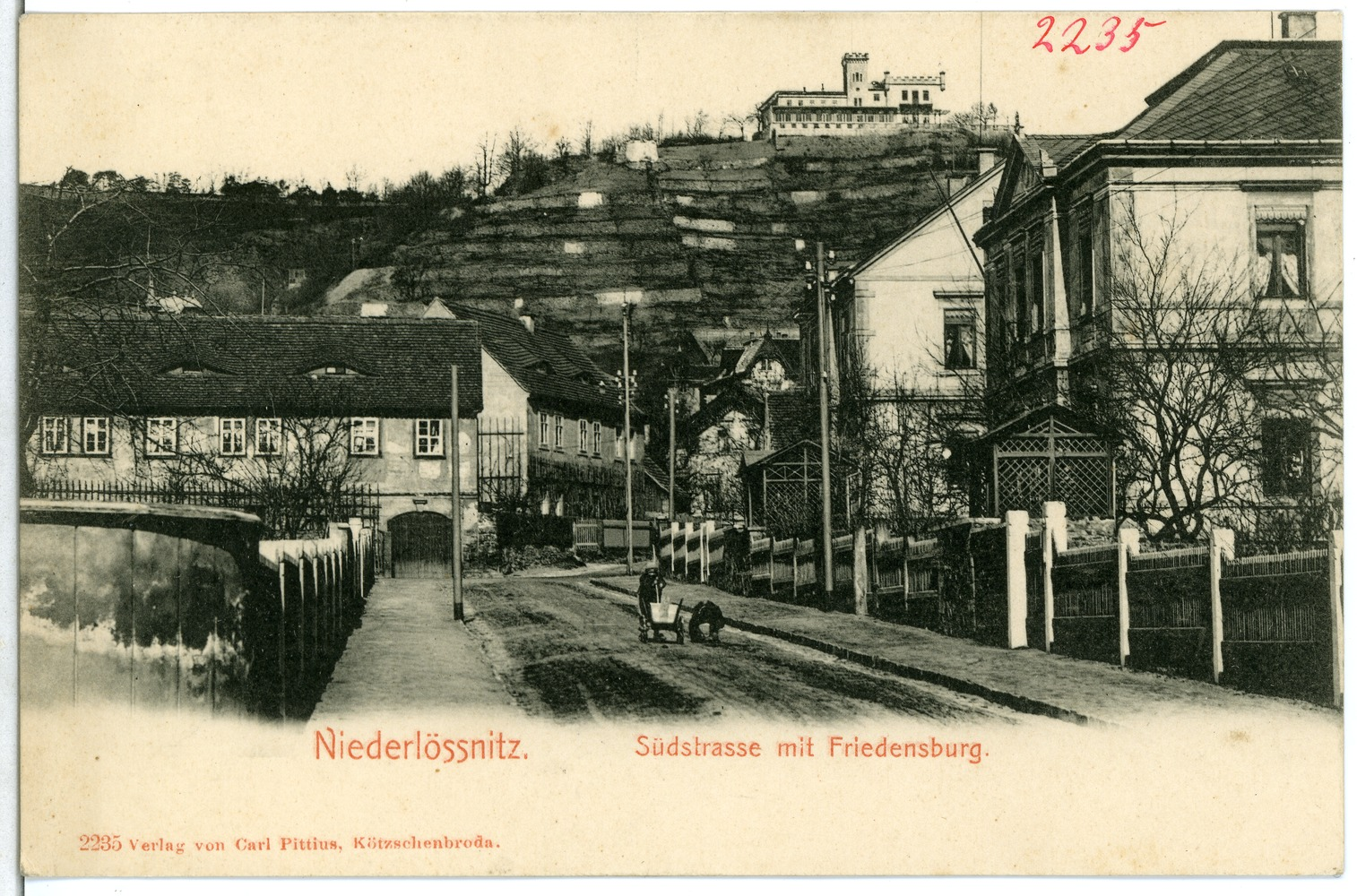 Niederlößnitz; Südstraße This postcard is from publisher Brück & Sohn in Meißen ( postcard has a unique number 02235 and is available in a higher resolution at the publisher. This images was uploaded in a cooperation project between Wikipedians and the publisher.